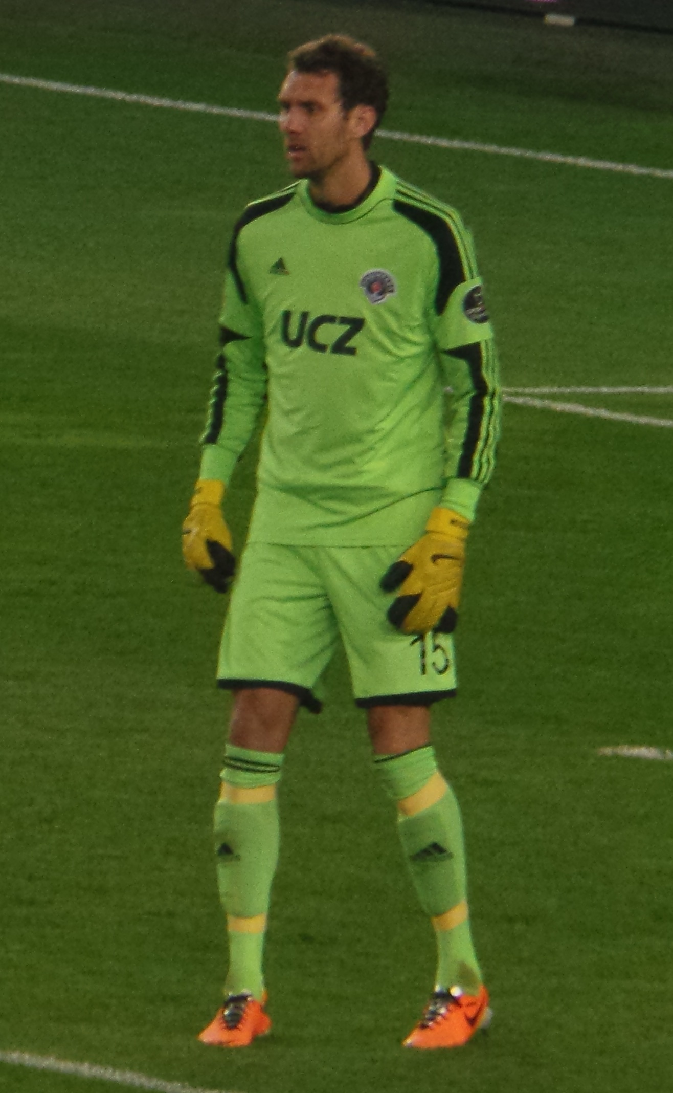 Andreas Isaksson